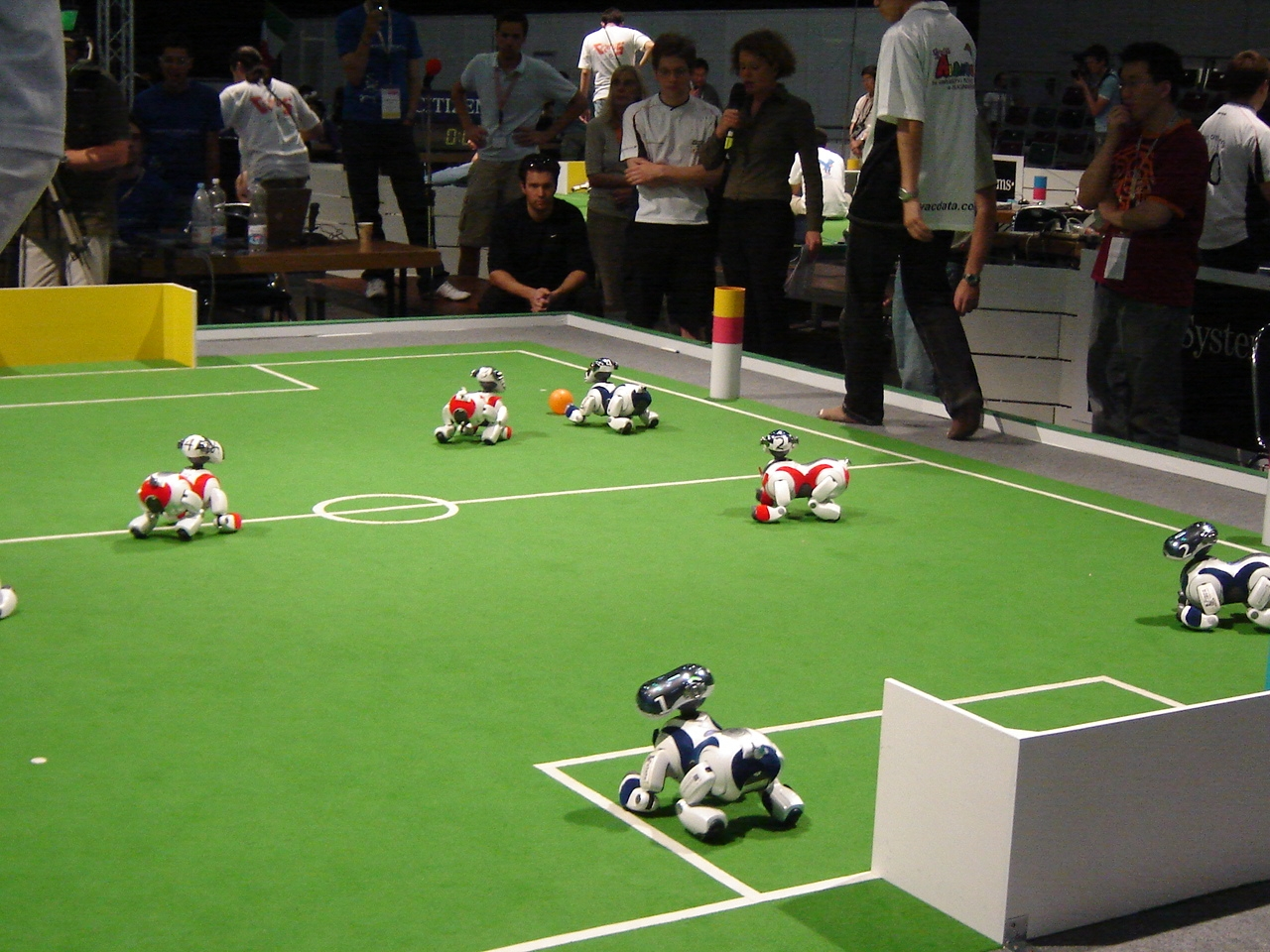 A foto foi tirada por mim: Jorge Gripp Robocup 2006, Bremen, Alemanha Categoria Four-Legged (Aibos)